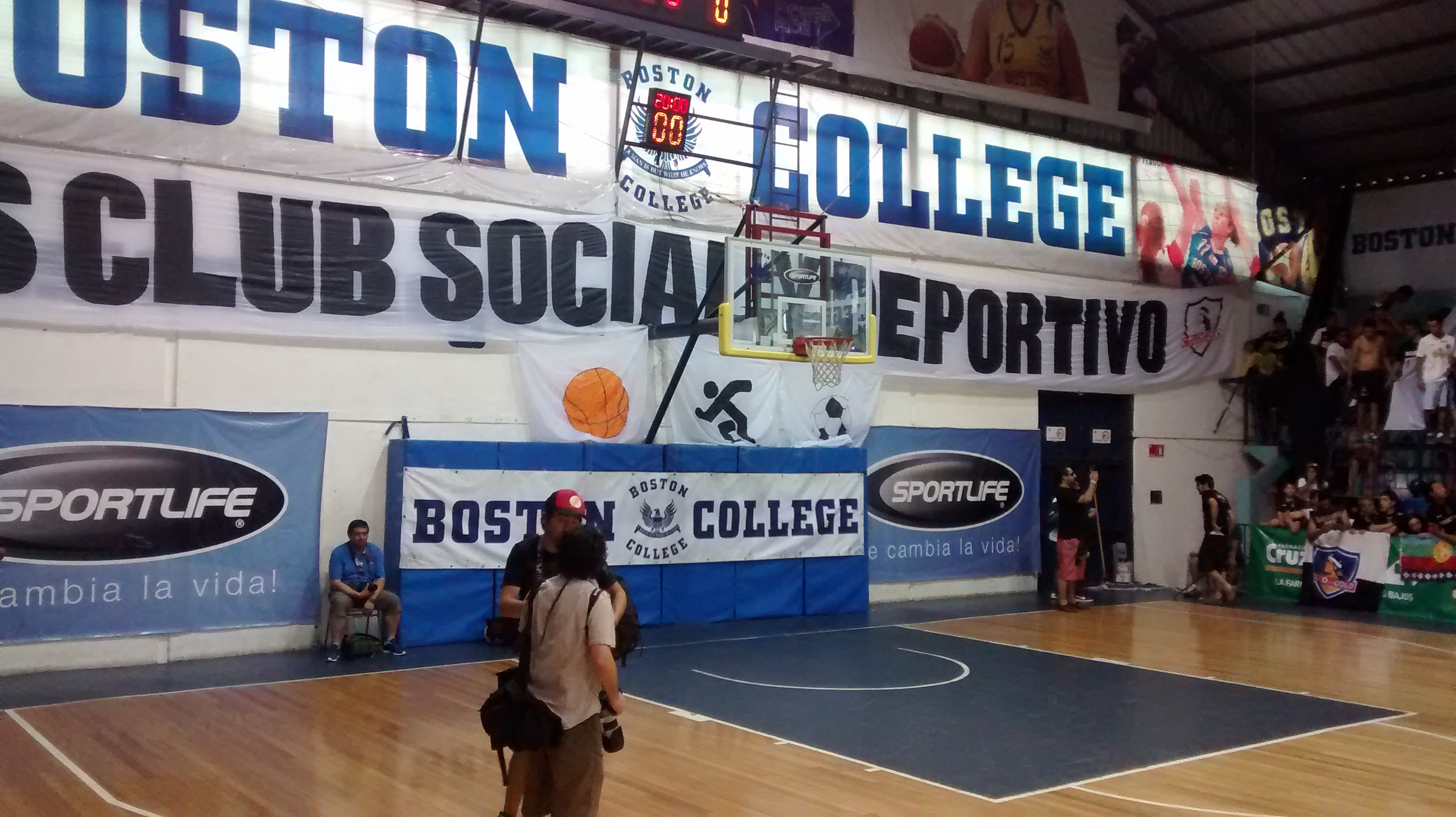 final LNB 2014-15